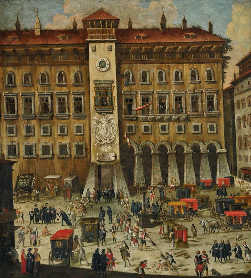 Il Tribunale della Vicariatitle QS:P1476,it:"Il Tribunale della Vicaria" label QS:Lit,"Il Tribunale della Vicaria"